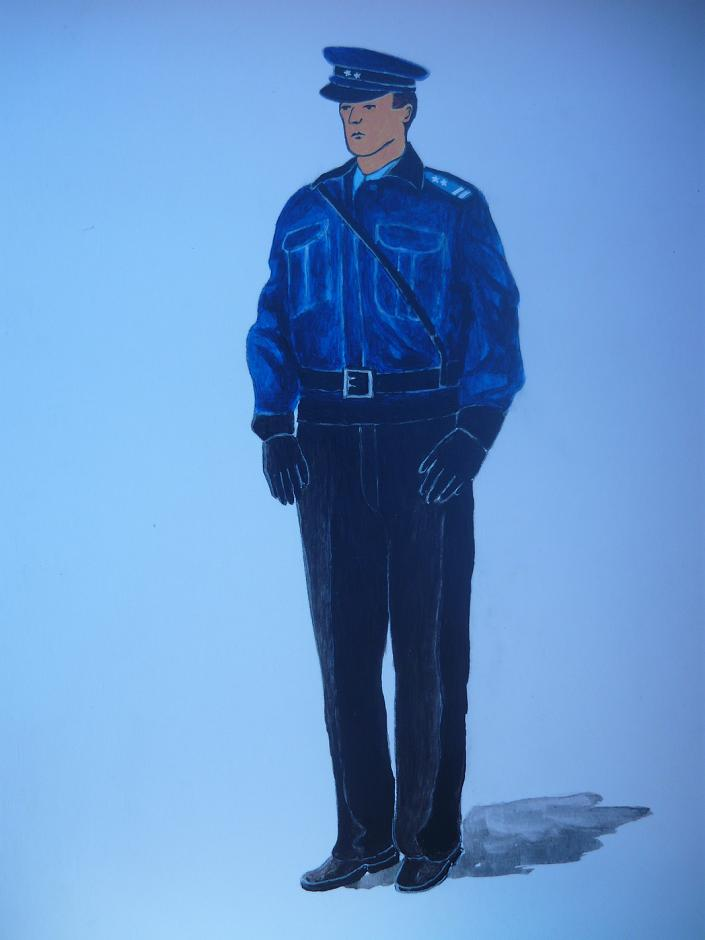 ubiór funkcjonariusza Akcji Socjalistycznej